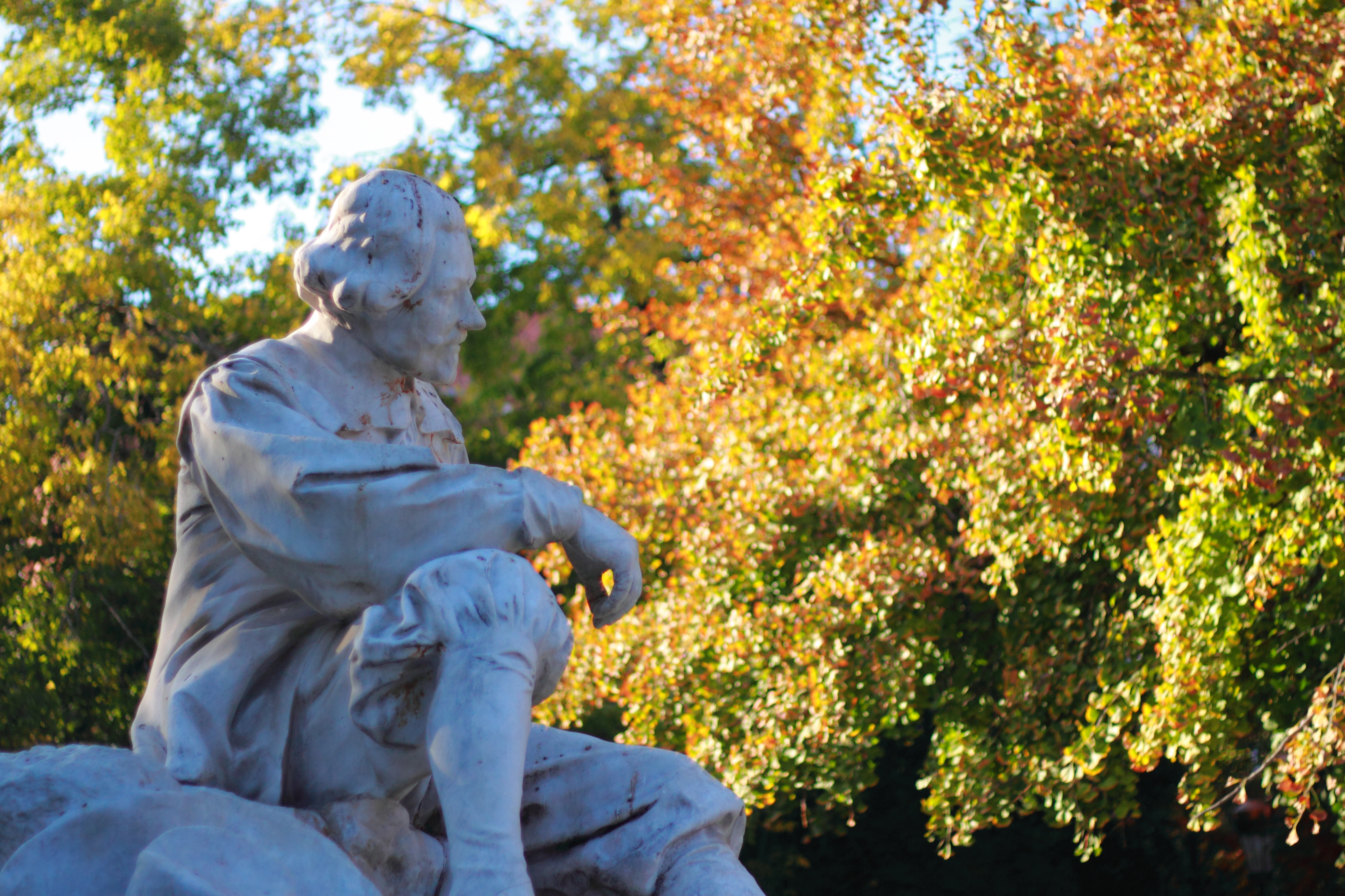 Statue de la place Wilson de Toulouse en automne